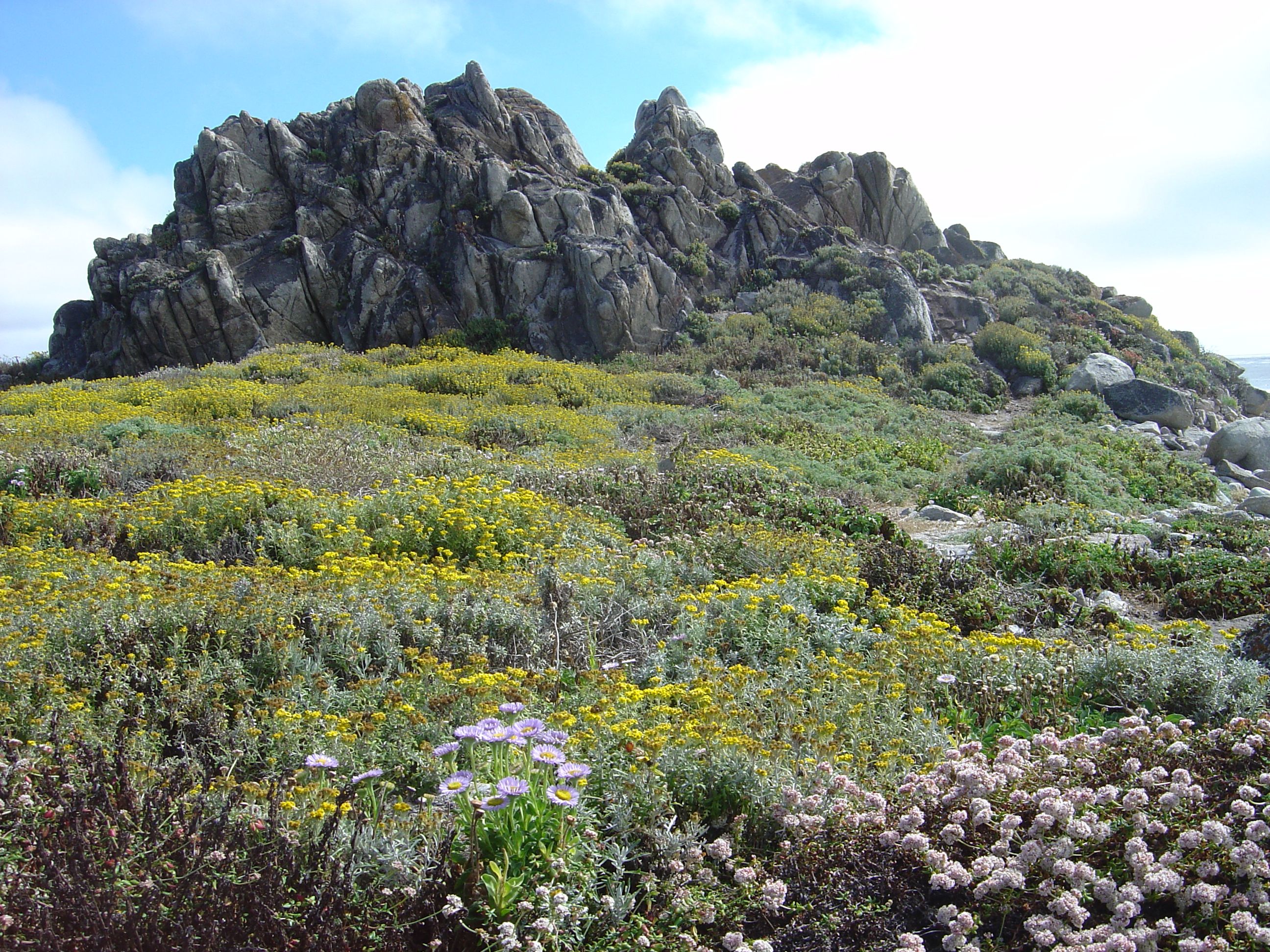 Blühende Wildblumen am Fuße des China Rock, einem der interessantesten Punkte des 17-Mile Drive, Nähe Monterey, Kalifornien. – Die gelbblühenden Pflanzen sind evtl. Eriophyllum staechadifolium (?), Bestimmung unsicher.